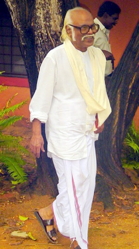 எழுத்தாளர் ஜெயகாந்தன்.